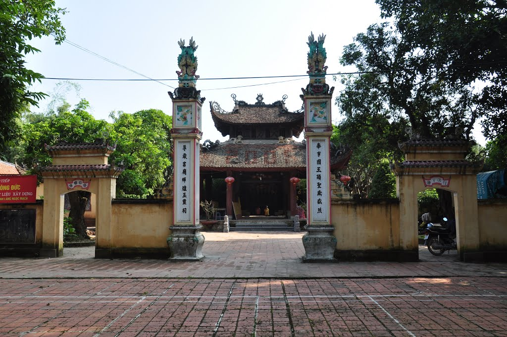 Đình Ngọc Mạch thờ Hoàng Tử Lý Nhã Lang ở làng Ngọc Mạch , Nam Từ Liêm , Hà Nội